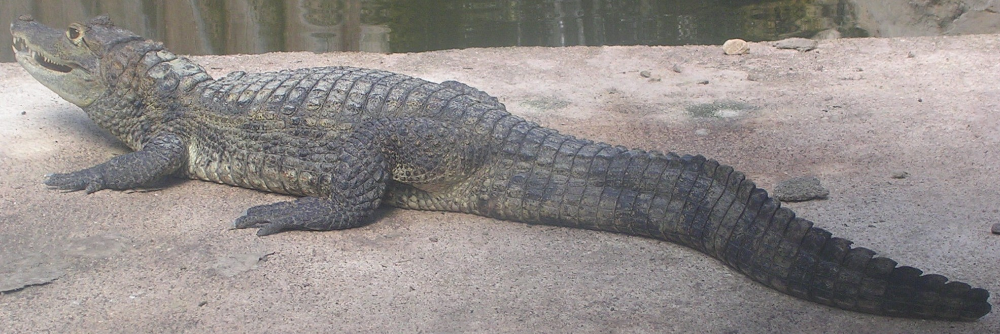 Caiman crocodilus crocodilus Caiman crocodylus crocodylus; Caïman à lunettes; Krokodilkaiman Photographie personnelle prise au Parc Phœnix à Nice, France Escaladix 20:44, 5 April 2006 (UTC)